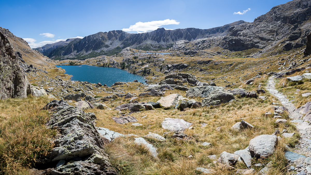 Refuge des Merveilles dans son élément.